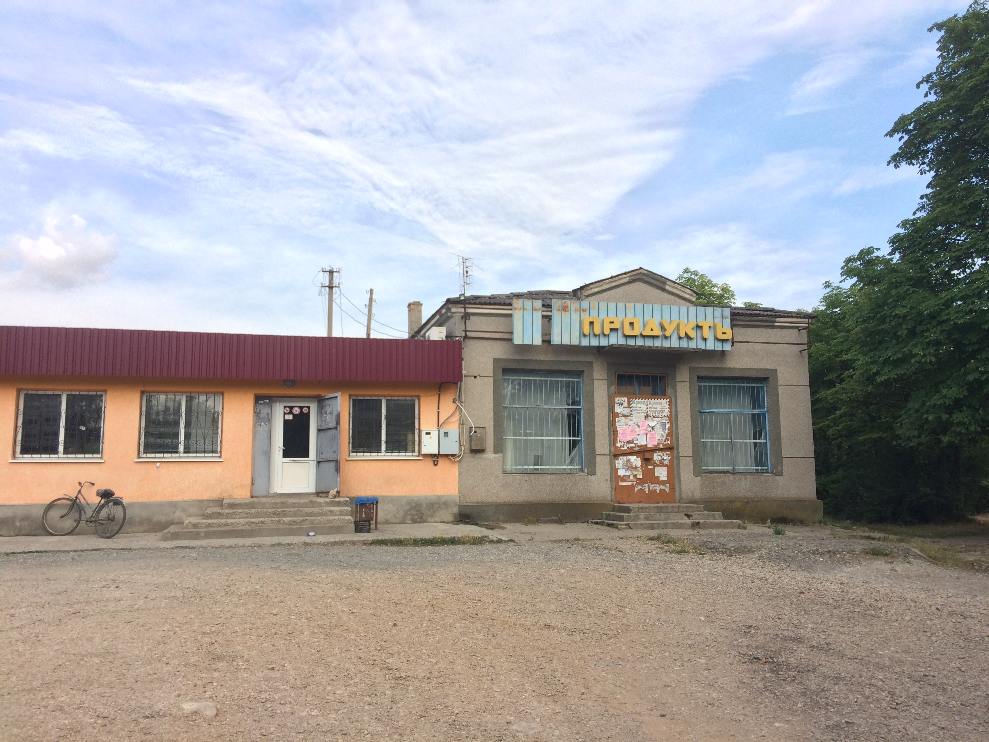 Магазин в с. Клёновка, Крым (2018)